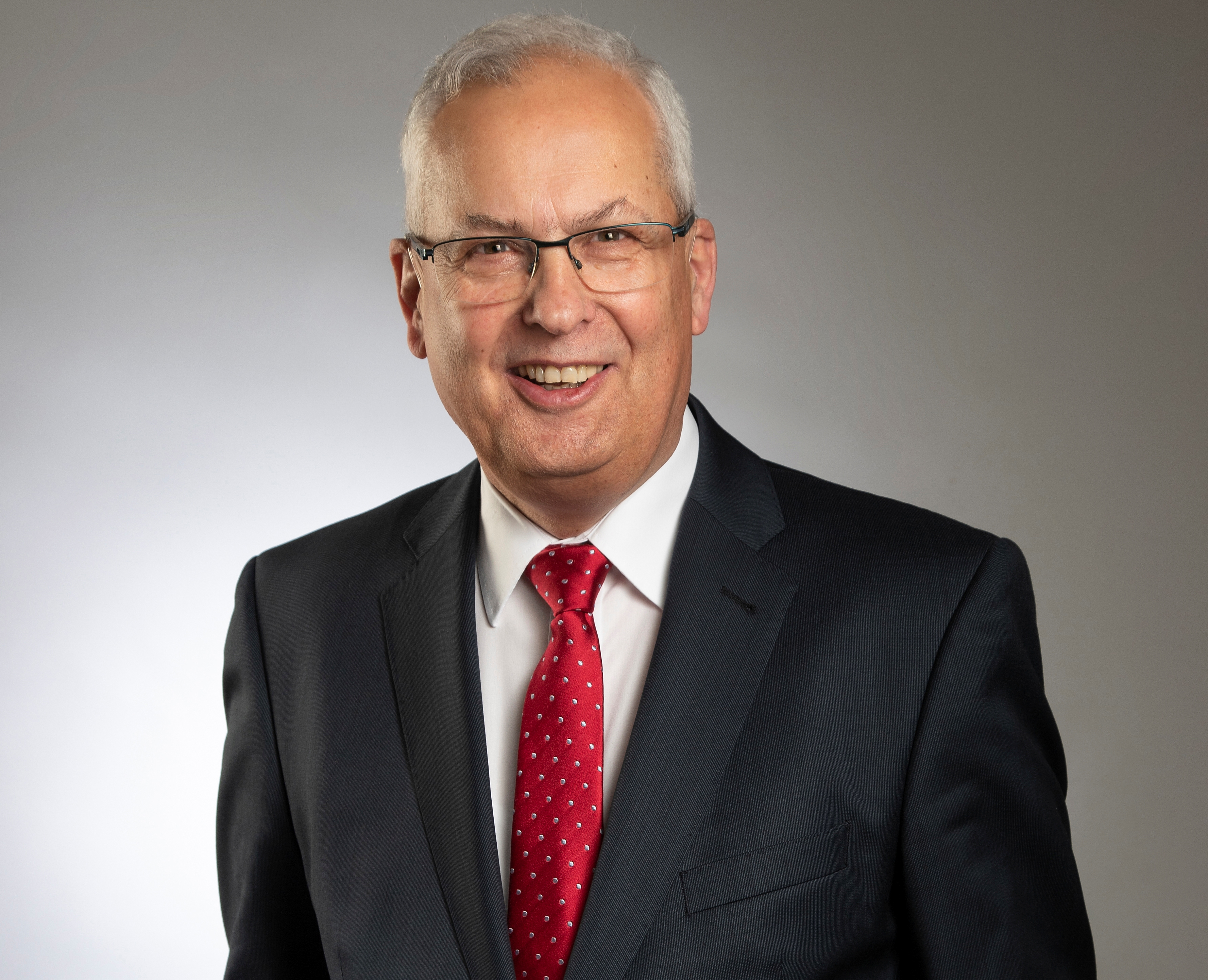 Landrat des Hochsauerlandkreies Dtr. Karl Schneider